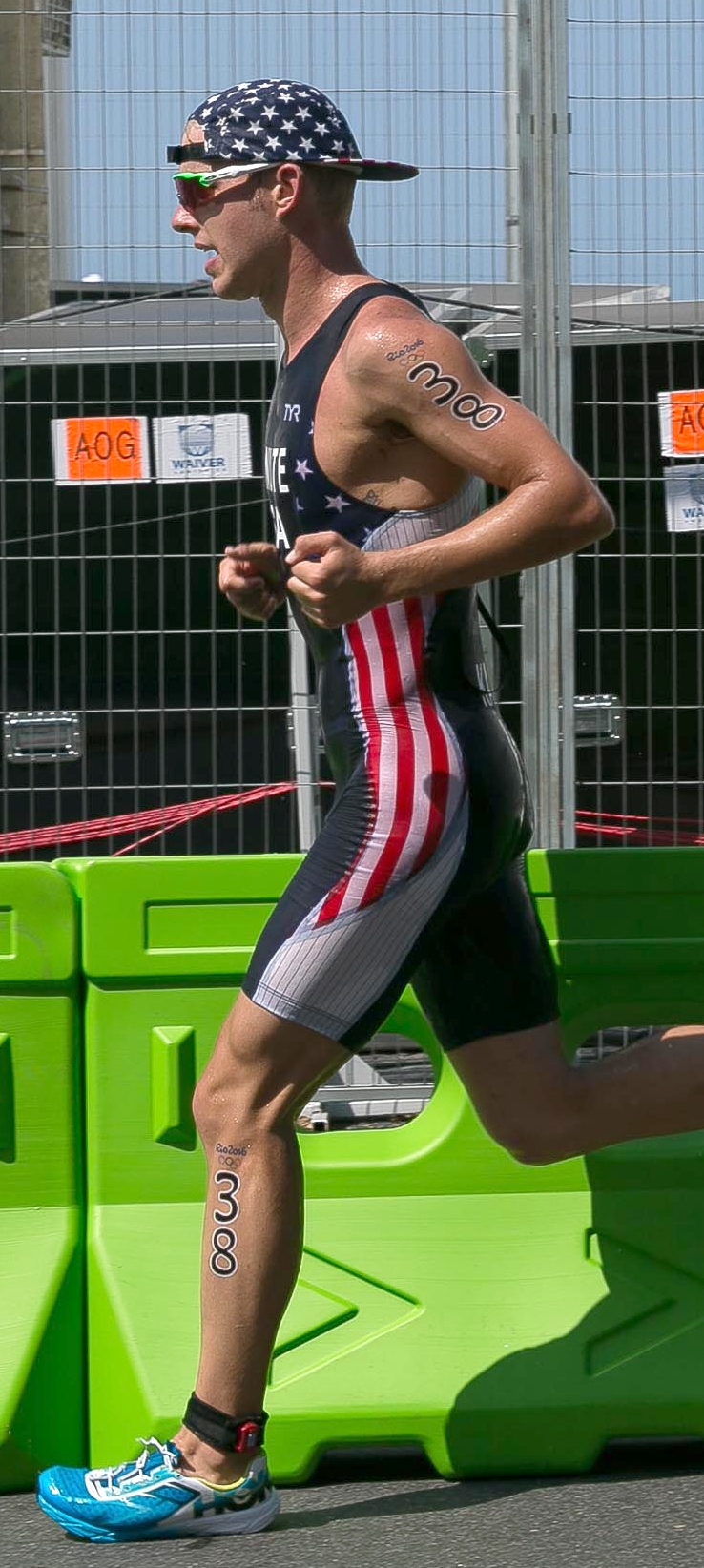 Atletas do Triatlo Masculino durante corrida, Copacabana , Rio de Janeiro